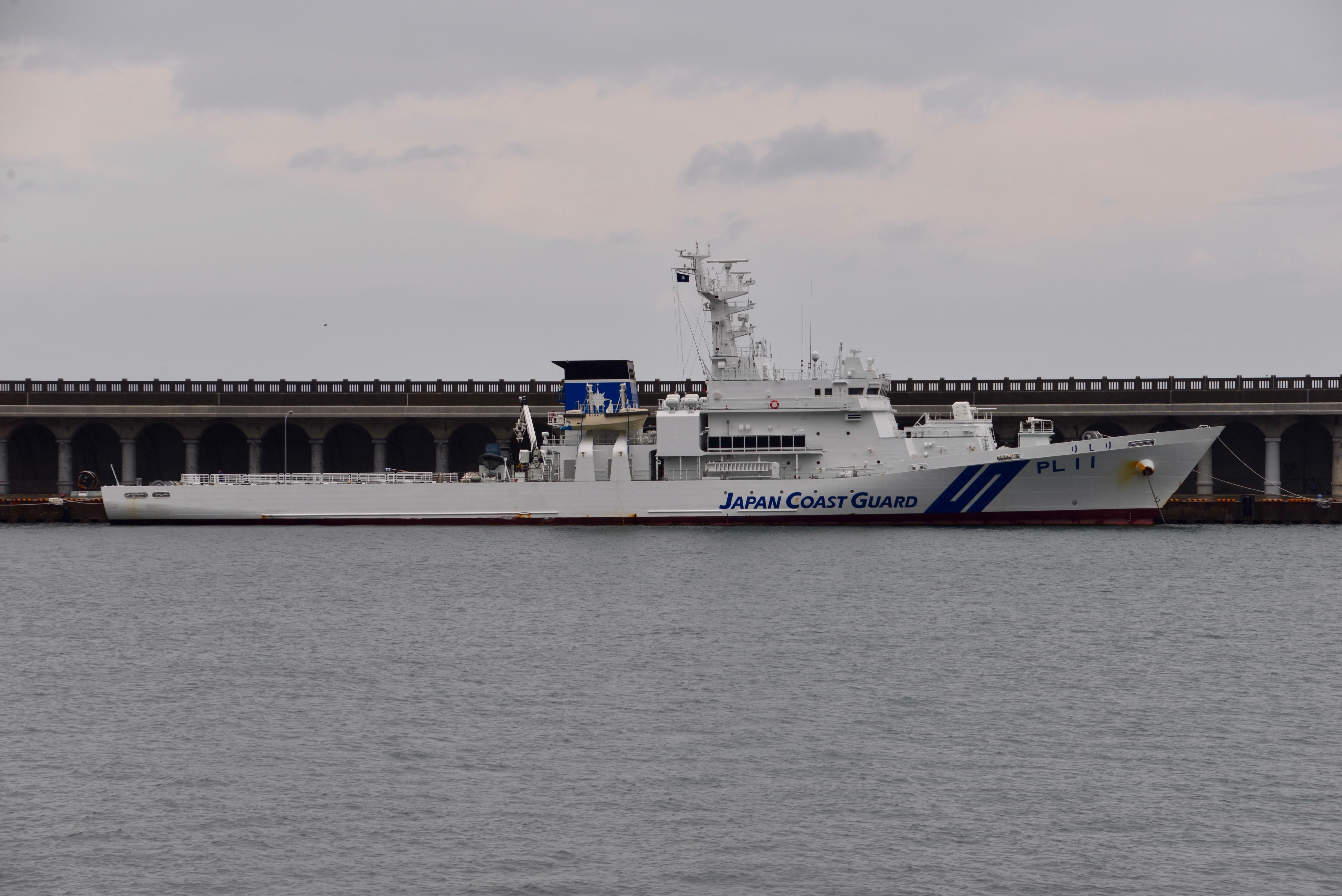 海上保安庁巡視船 PL11「りしり」稚内港にて